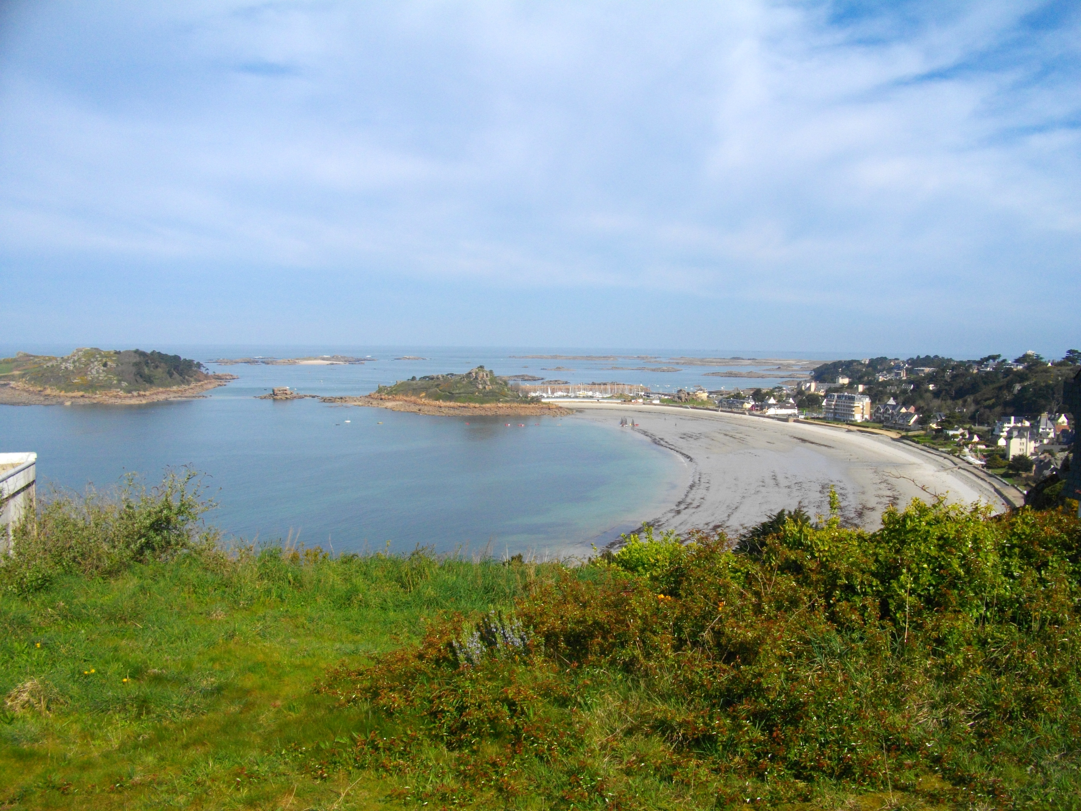 De droite à gauche : plage de Tresmeur, le Castel et l'île Milliau.